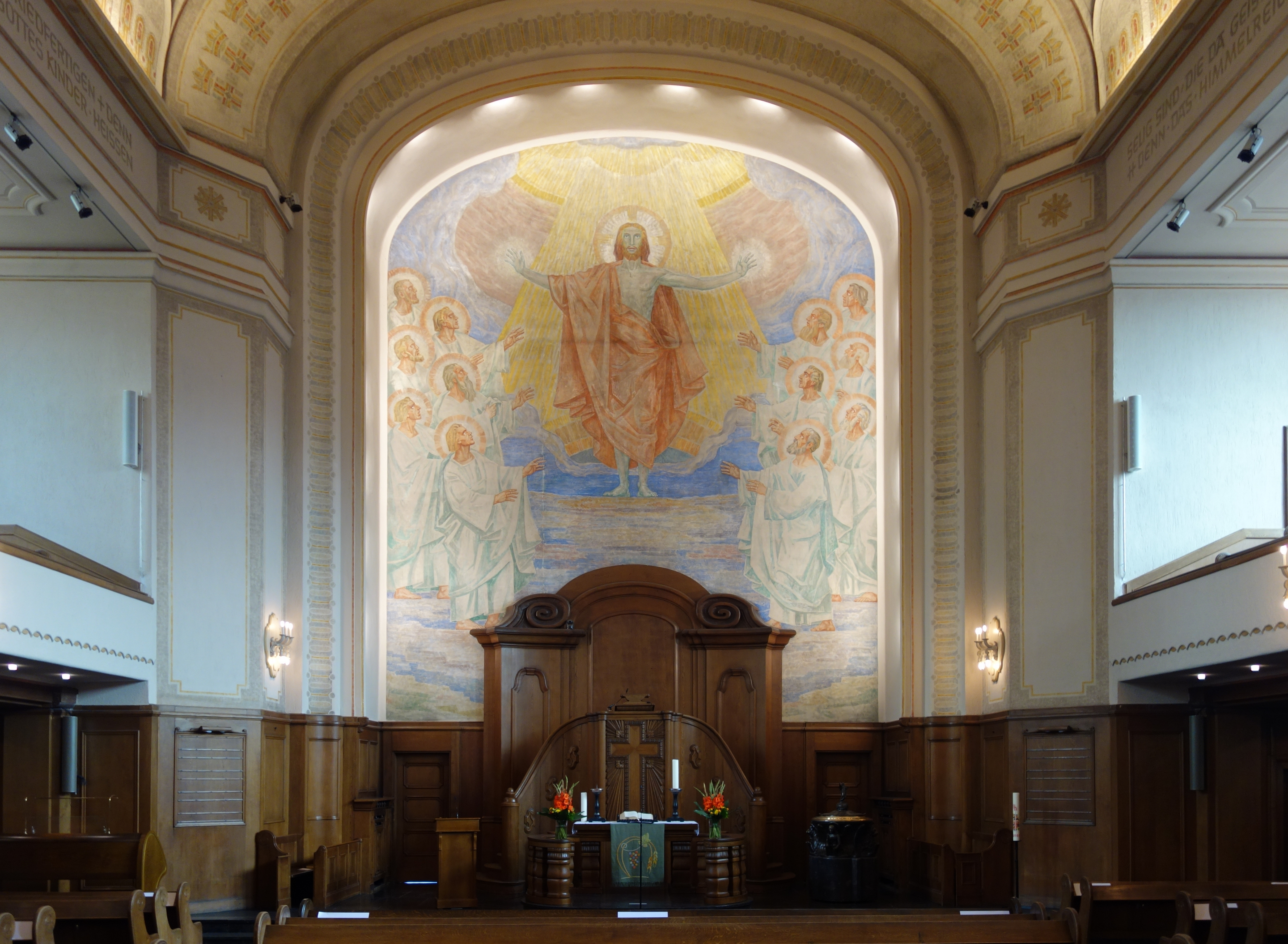 Innenraum der Evangelischen Auferstehungskirche in Düsseldorf-Oberkassel